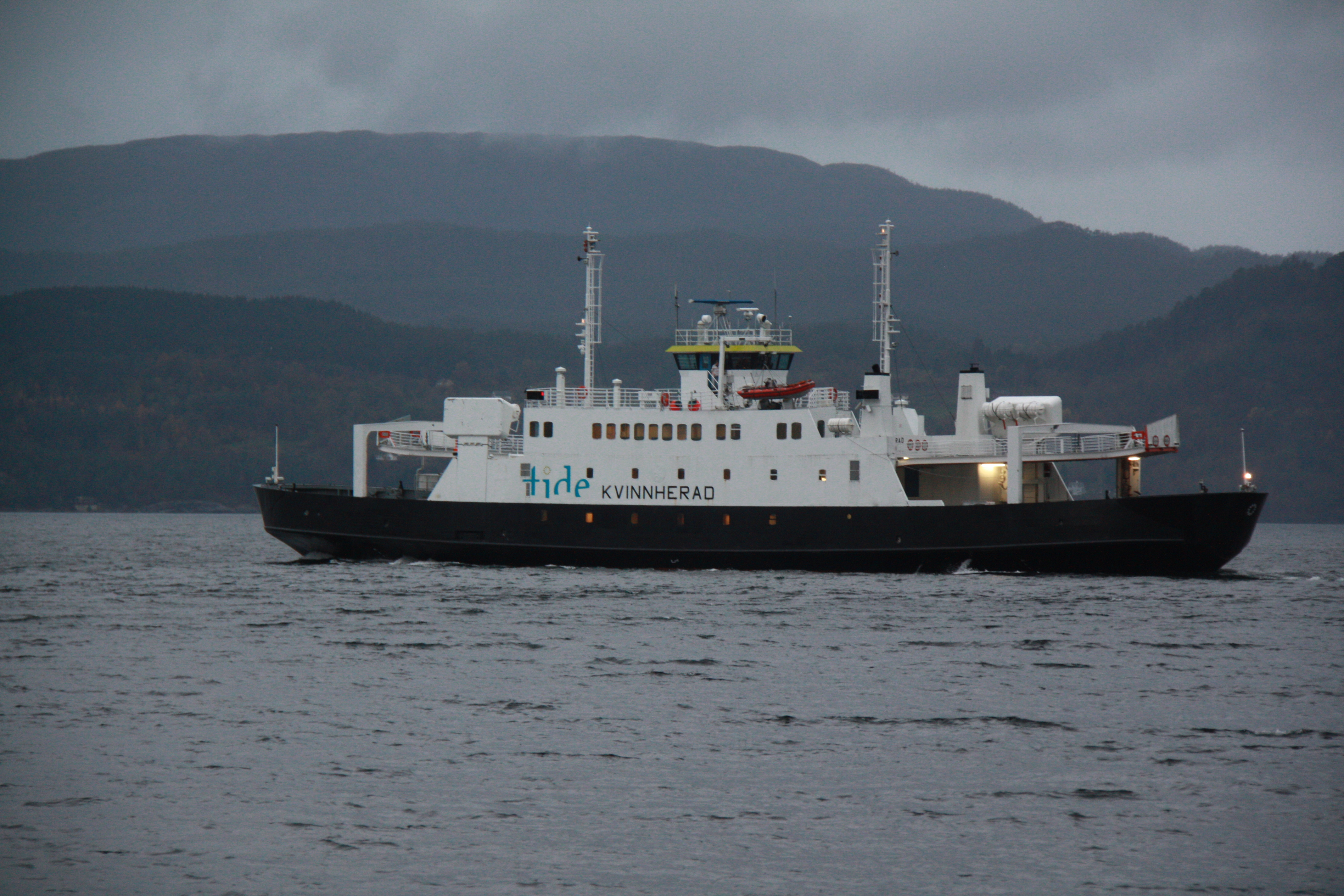 MF «Kvinnherad» forlater fergeleiet på Årsnes